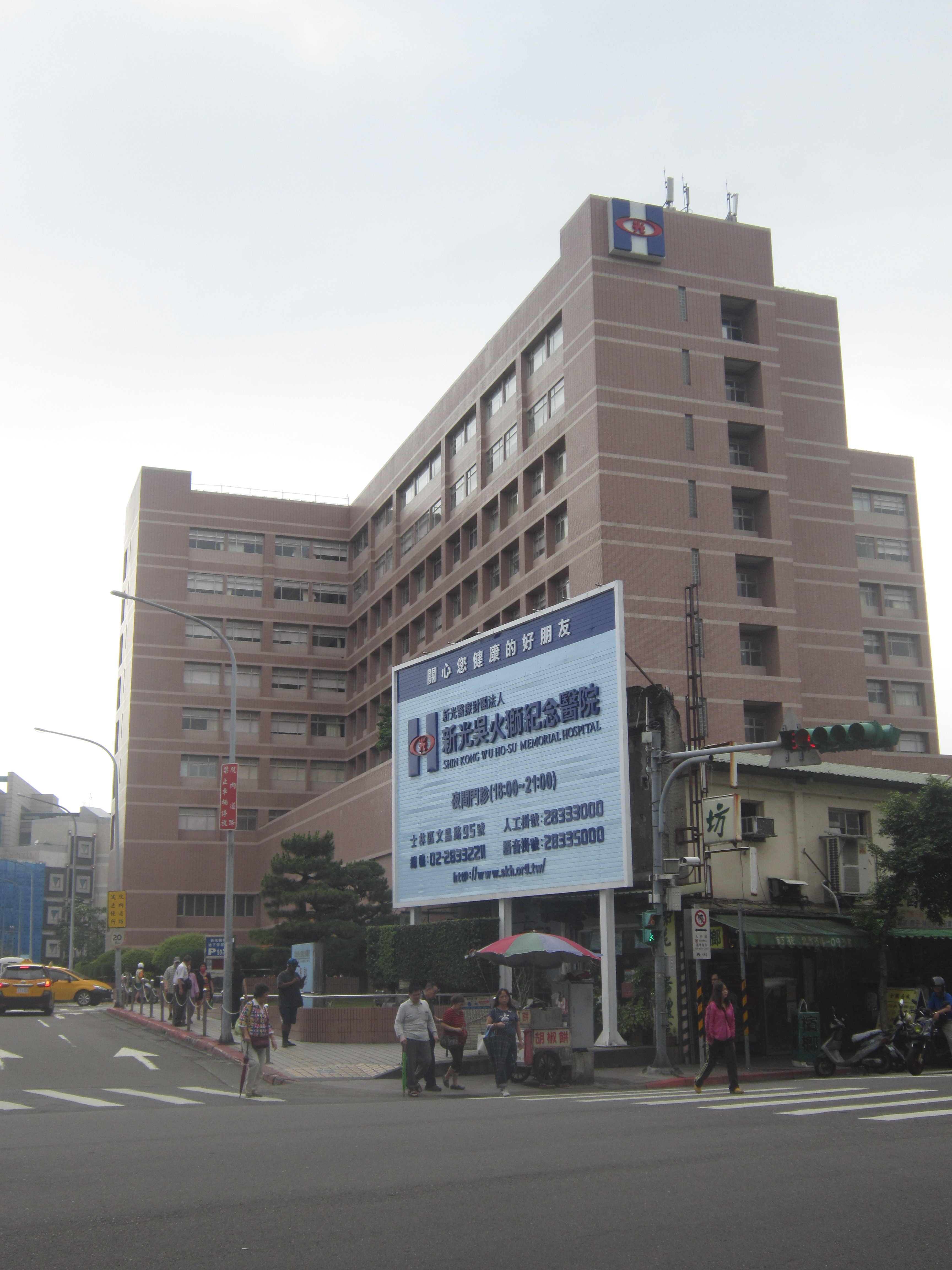 新光吳火獅紀念醫院，位於臺灣臺北市士林區文昌路95號。